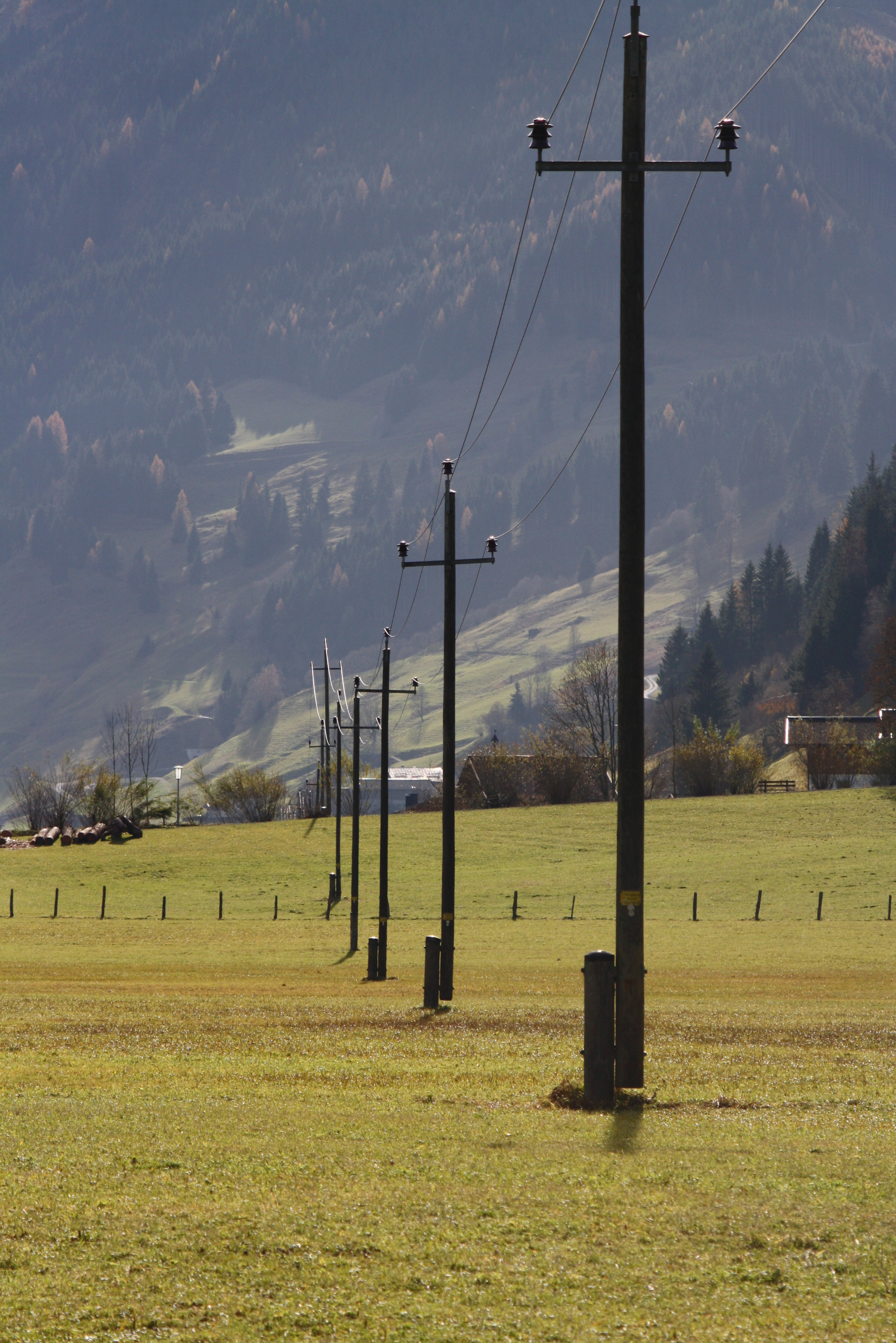 Wiese mit Stromleitung bei Großarl.